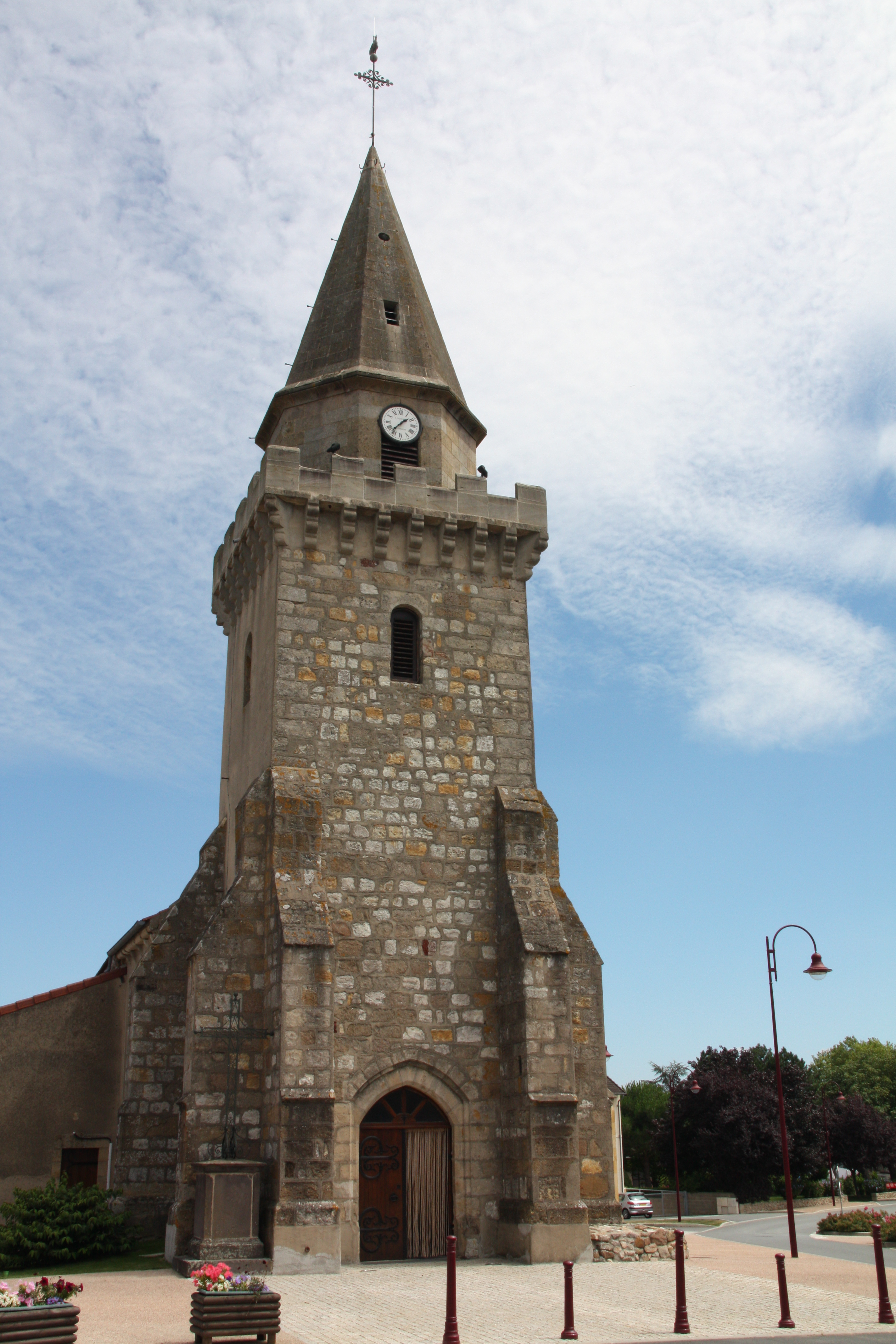 Église Saint-Maurice de Chamblet France